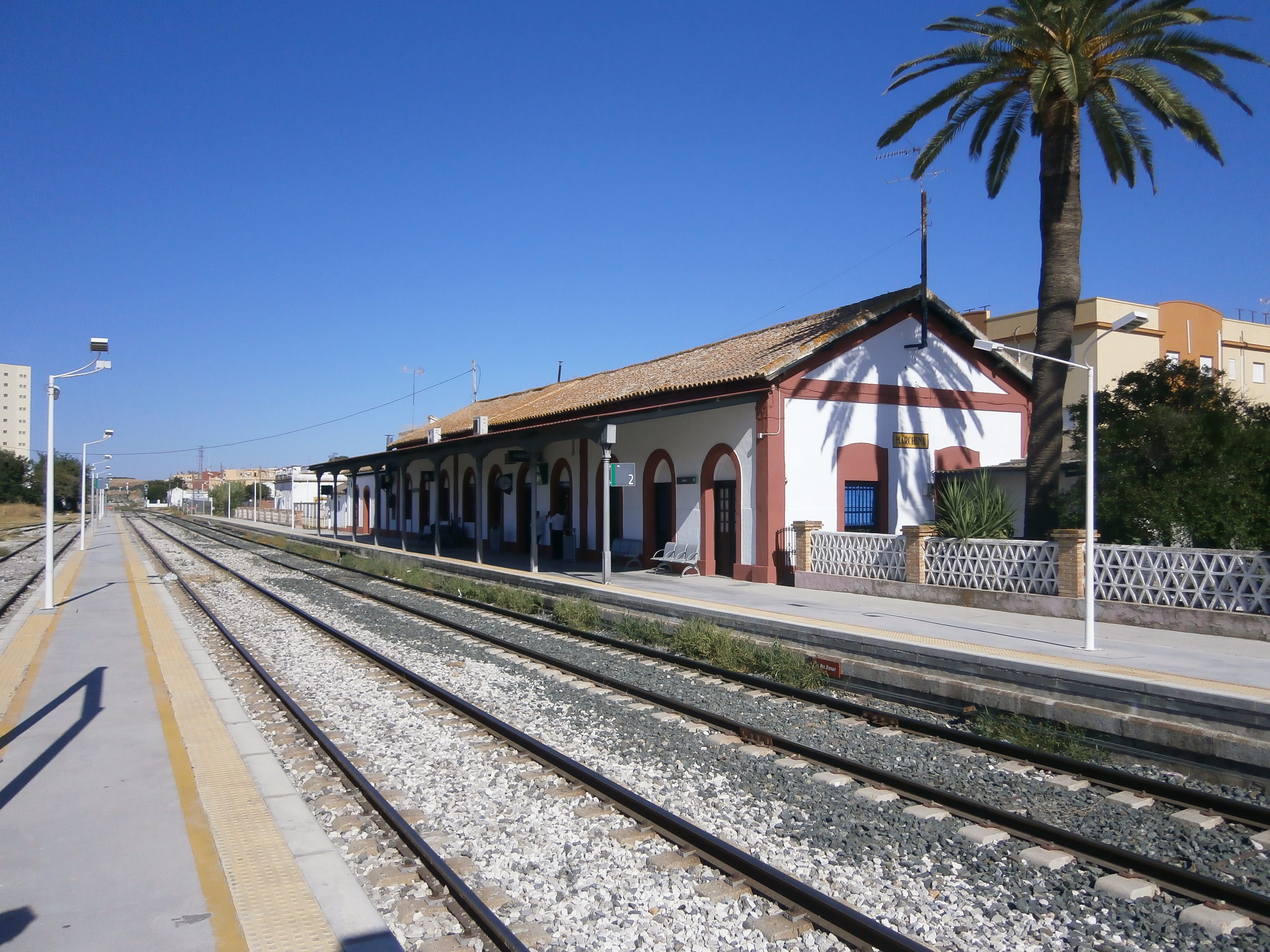 Estacion de Marchena andenes